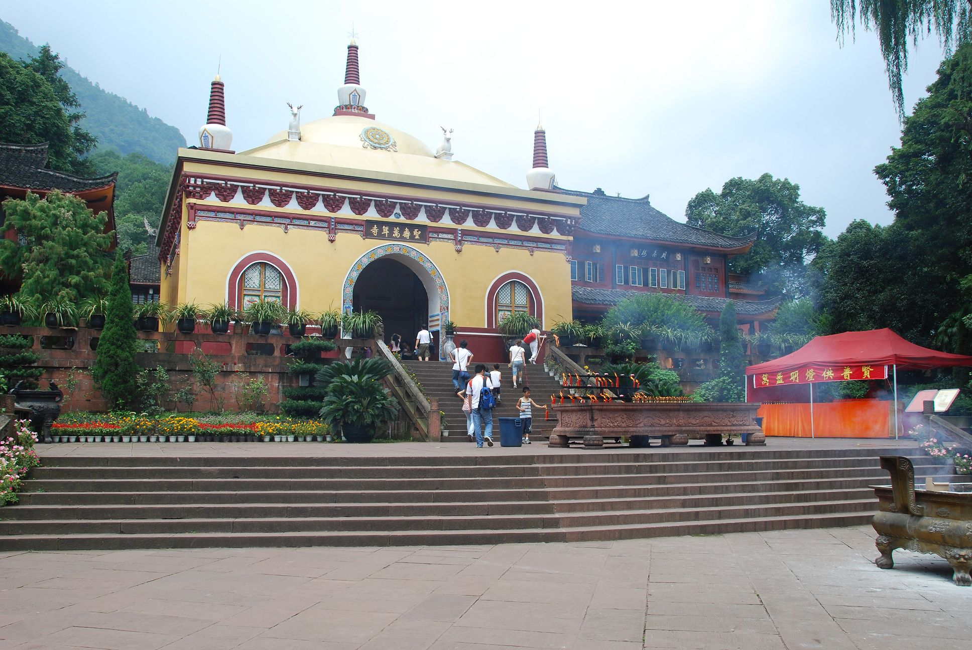 Emeishan, Leshan, Sichuan, China